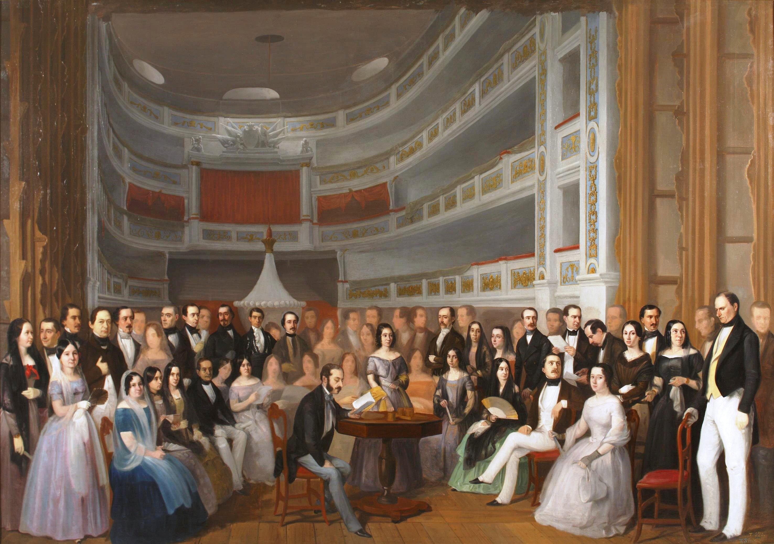 La obra representa al escritor y dramaturgo Ventura de la Vega (1807-1865), leyendo una de sus obras ante un numeroso público en el Teatro del Príncipe de la ciudad de Madrid, que actualmente recibe el nombre de Teatro Español.